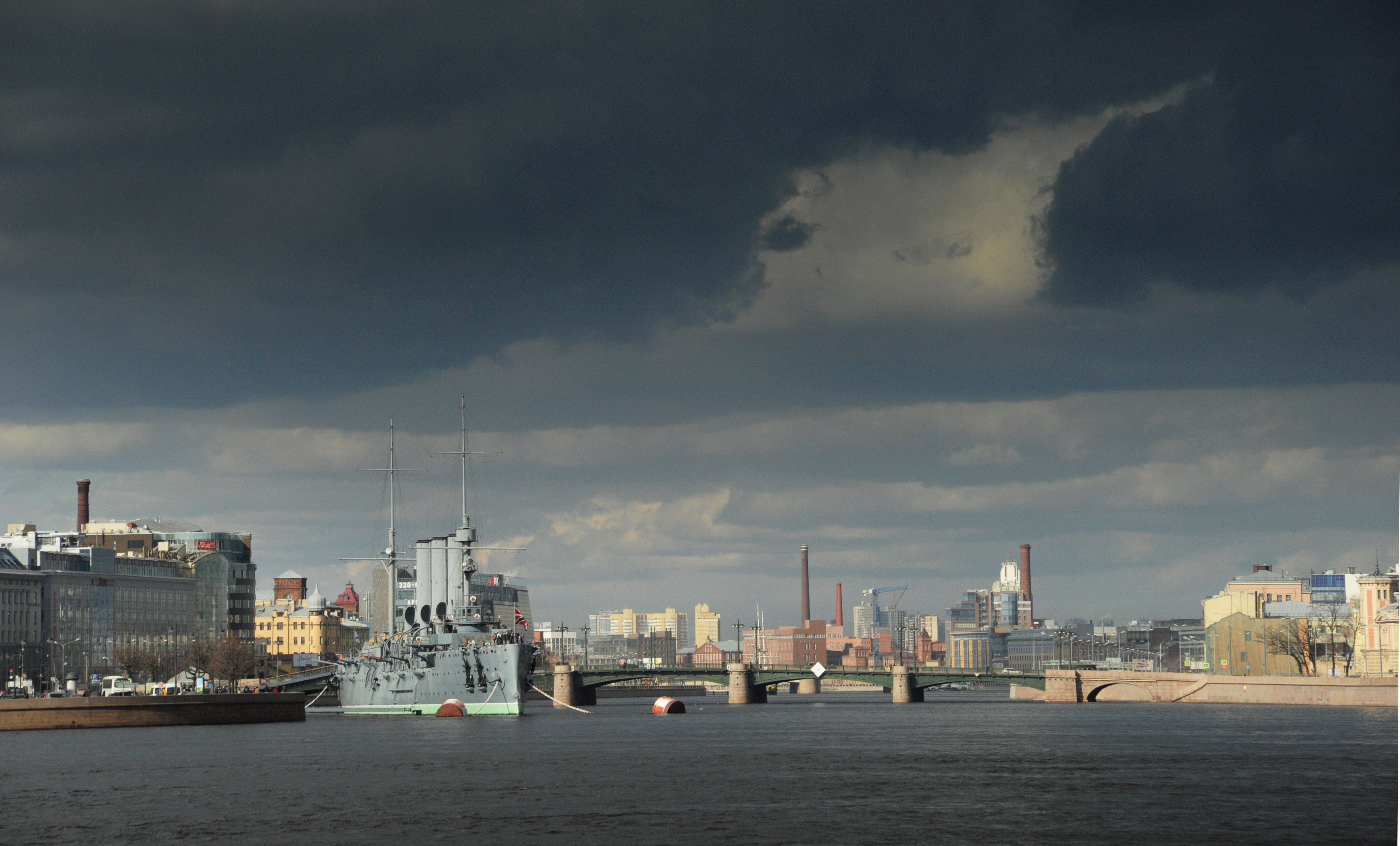 Крейсер Аврора